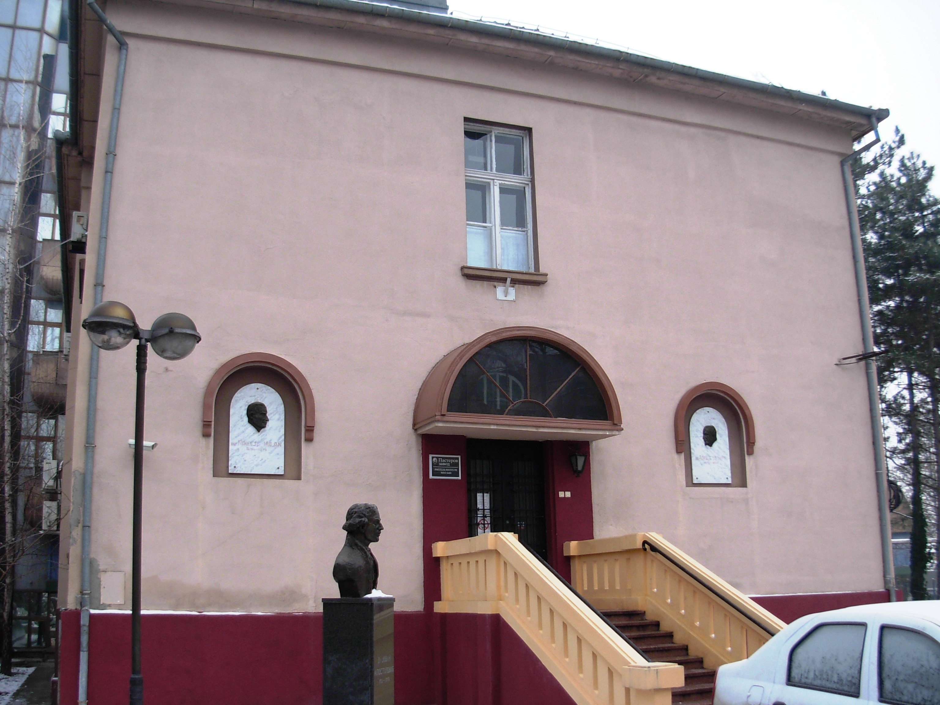 Zgrada Pasterovog zavoda u Novom Sadu.